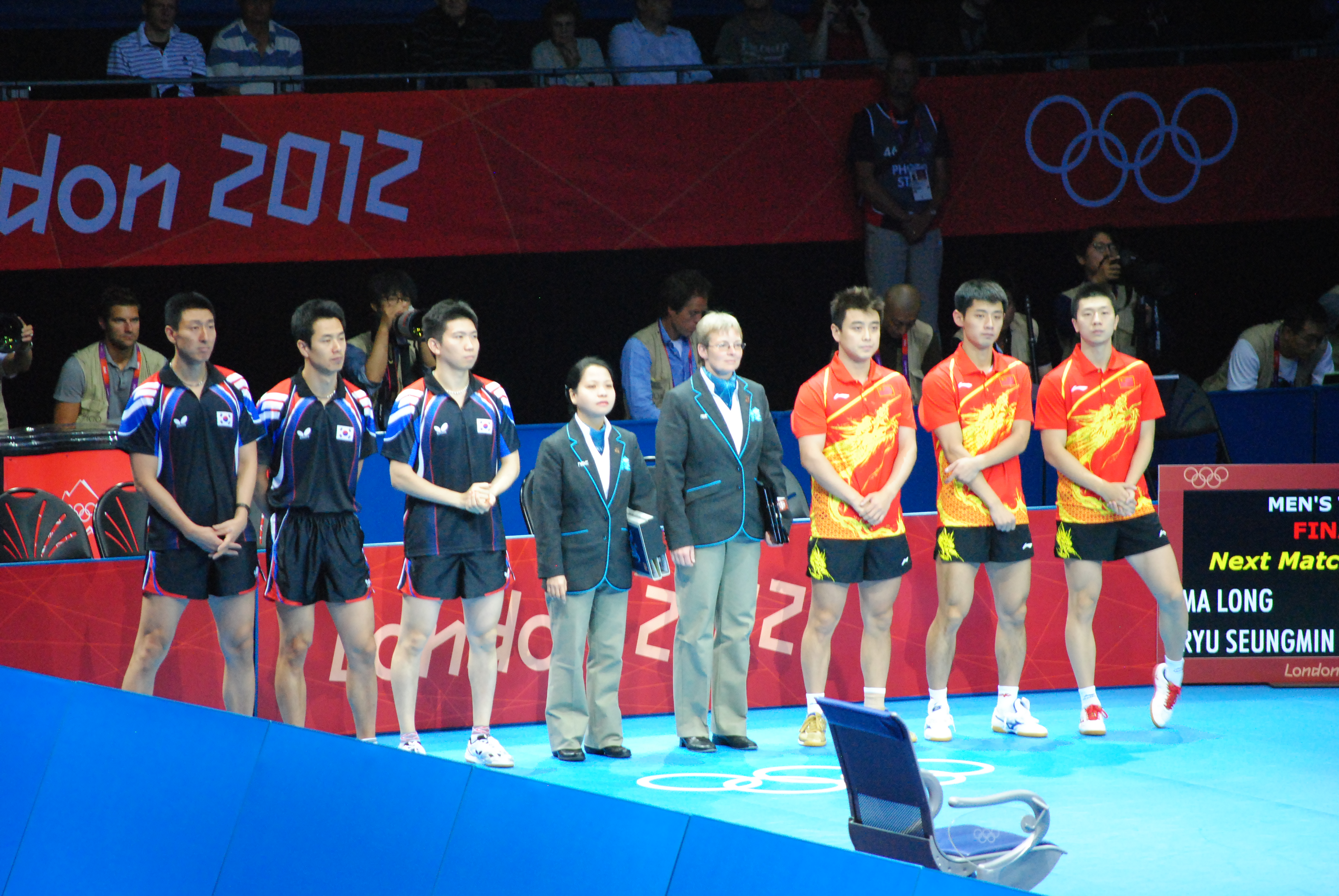 ExCel Arena